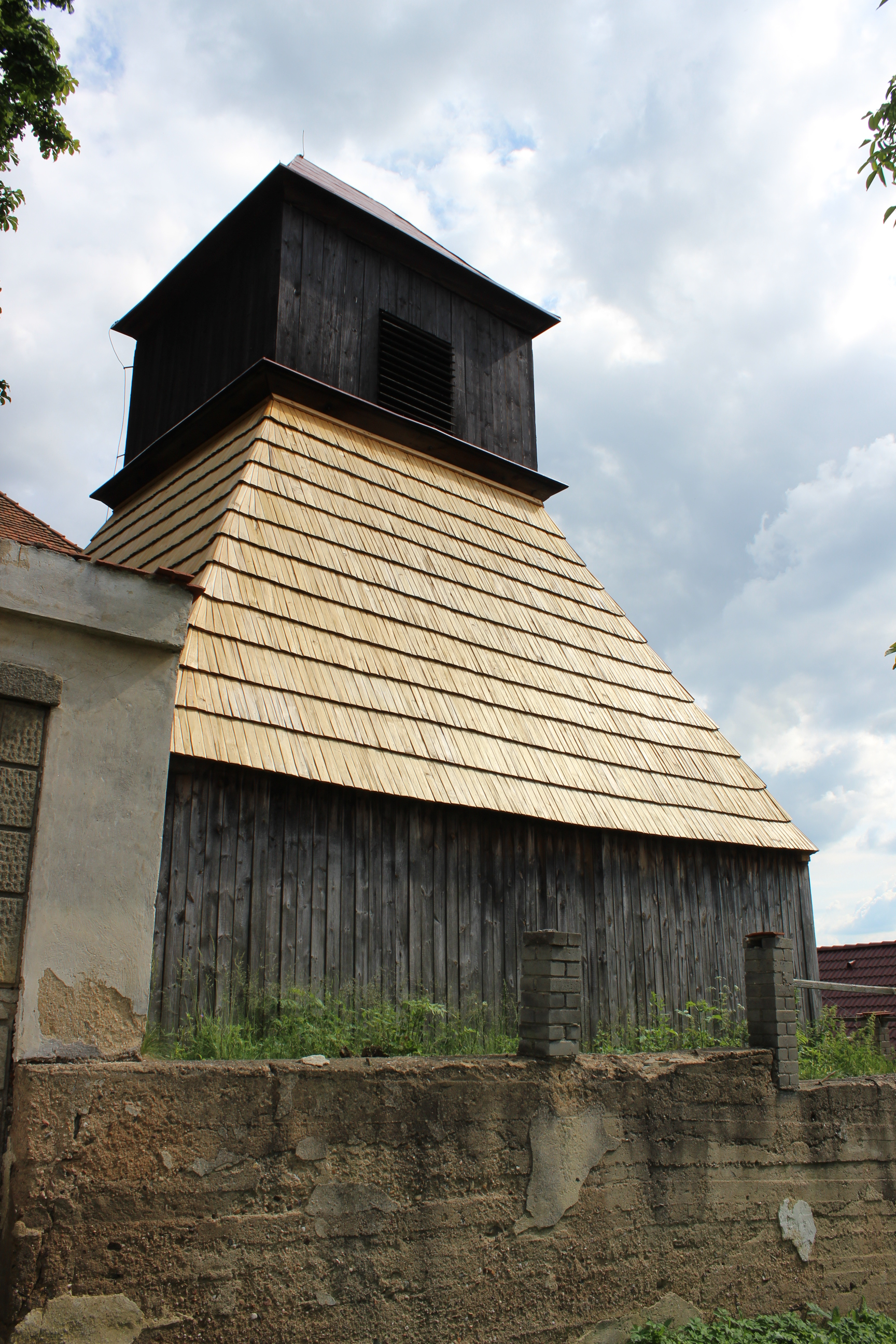 Zvonice u kostela svatého Štěpána ve Skřivani.